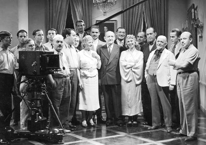 Reżyser Joseph Schenk (stoi pomiędzy kobietami) z artystami w atelier podczas nagrywania filmu "Gehenna" w/g powieści Heleny Mniszkówny. Widoczni m.in.: Mieczysława Ćwiklinska (stoi pośrodku), Ina Benita (6. z prawej), Antoni Fertner (3. z prawej), Witold Zacharewicz, Michał Waszyński (7. z lewej), Albert Wywerka, Włodzimierz Łoziński (2. z prawej), Leopold Brodziński (5. z prawej).